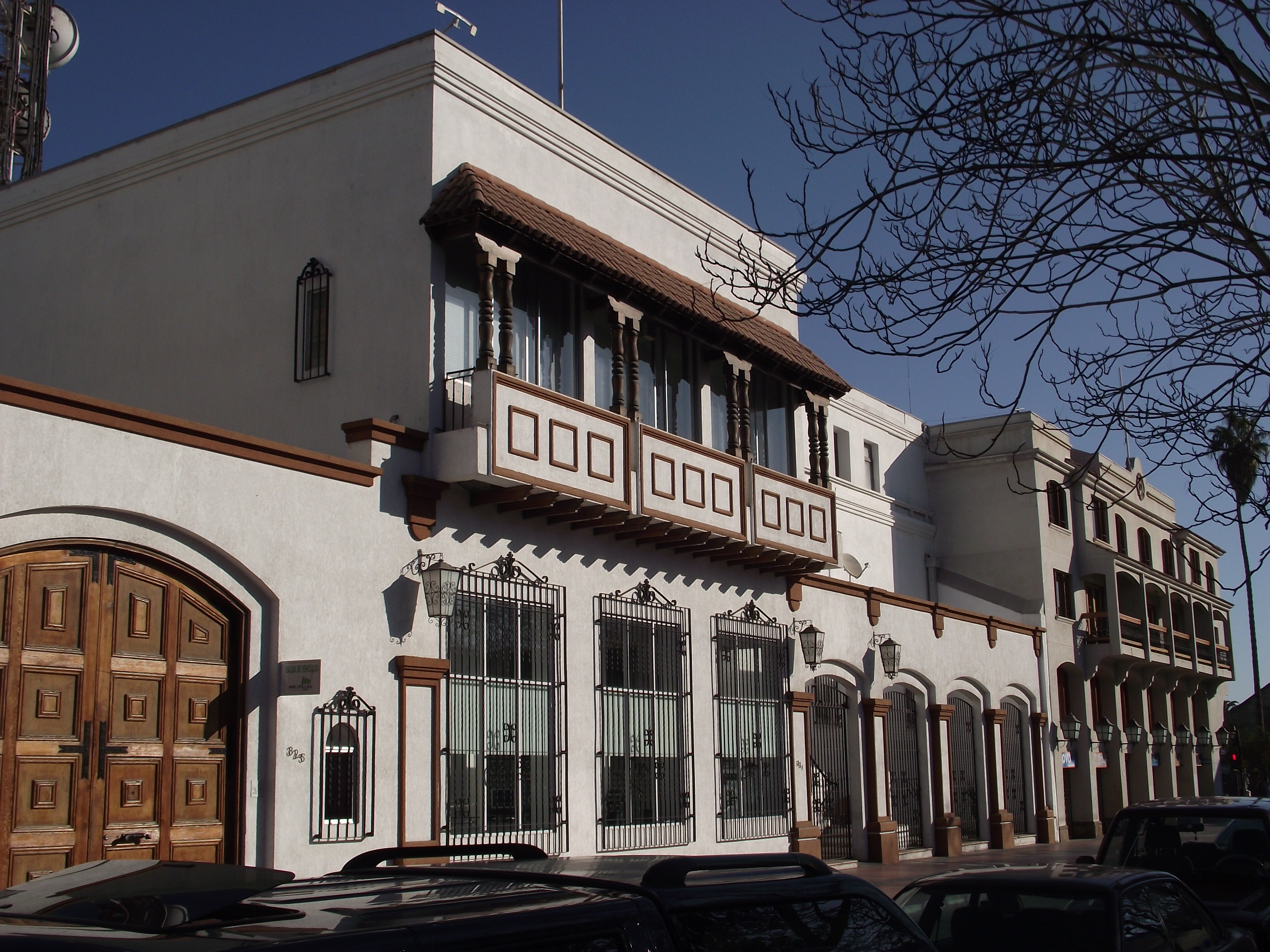 Edificio de la Compañía de Teléfonos de Chile (Telefónica) en La Serena.